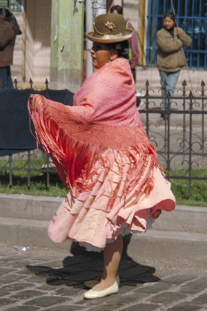 Morenada